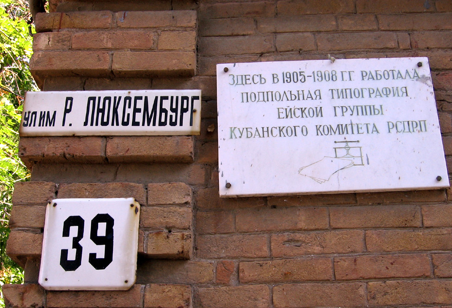 Табличка о типографии ейского РСДРП